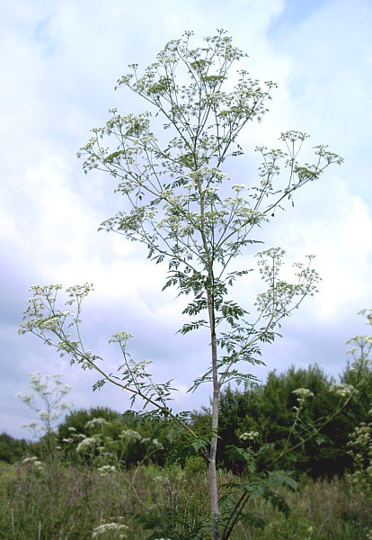 self taken photo